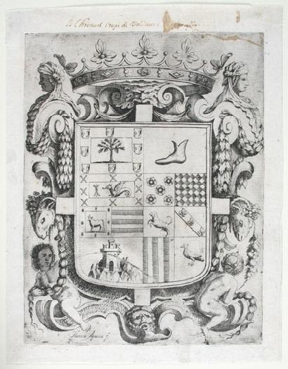 Escudo de armas del escritor y jurista español Cristóbal Crespí de Valldaura y Parizuela (1599-1671), aguafuerte, Museo de Huesca.